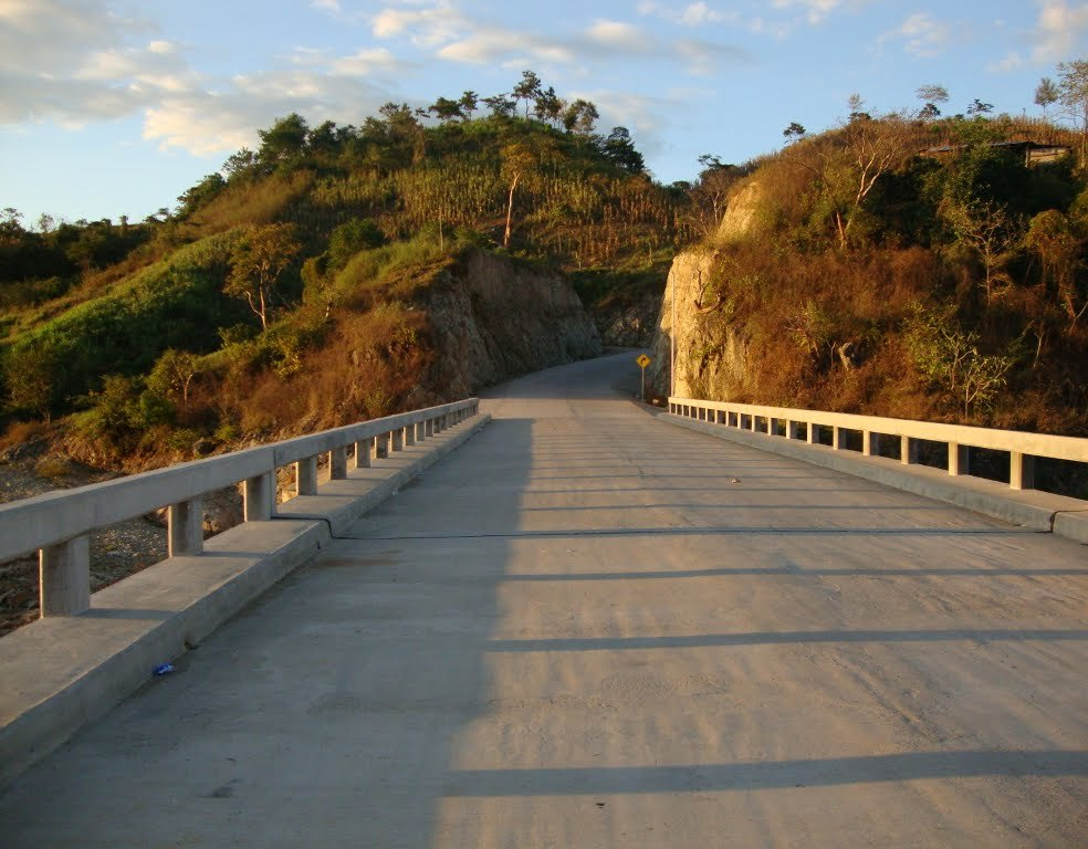 Puente la Integracion